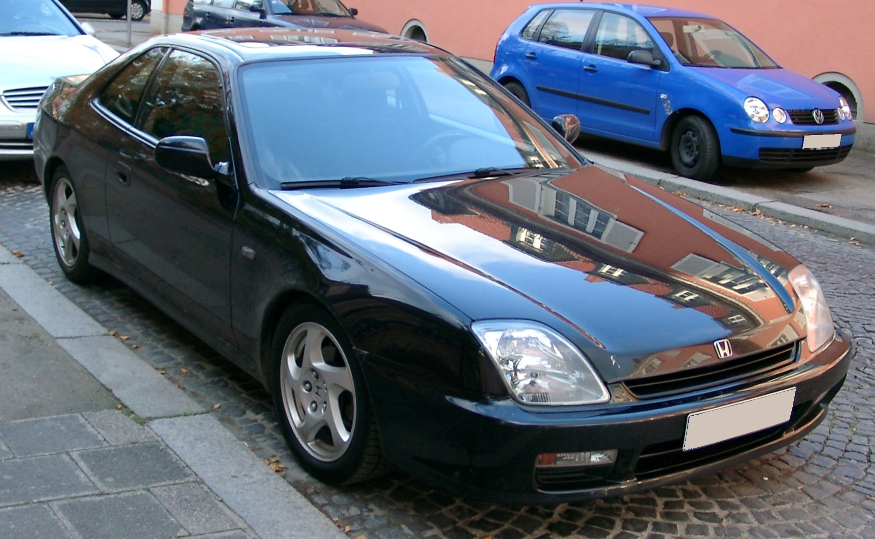 Honda Prelude (5. Generation)